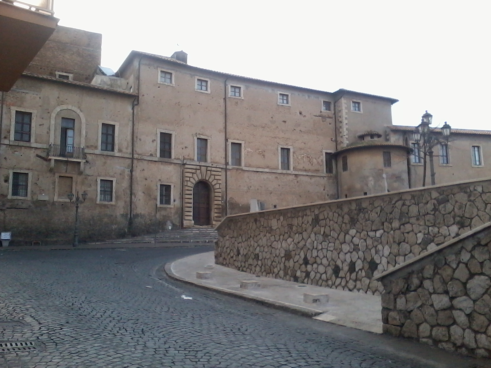 Palazzo Caetani a Cisterna